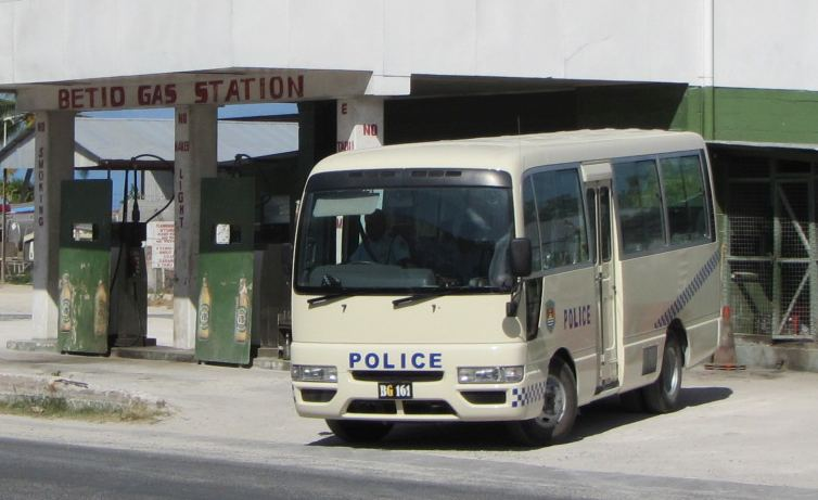 Polizeiauto in Betio, Kiribati